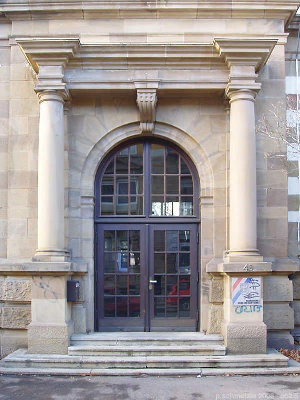 Portal der Rosenau-Schule in Heilbronn